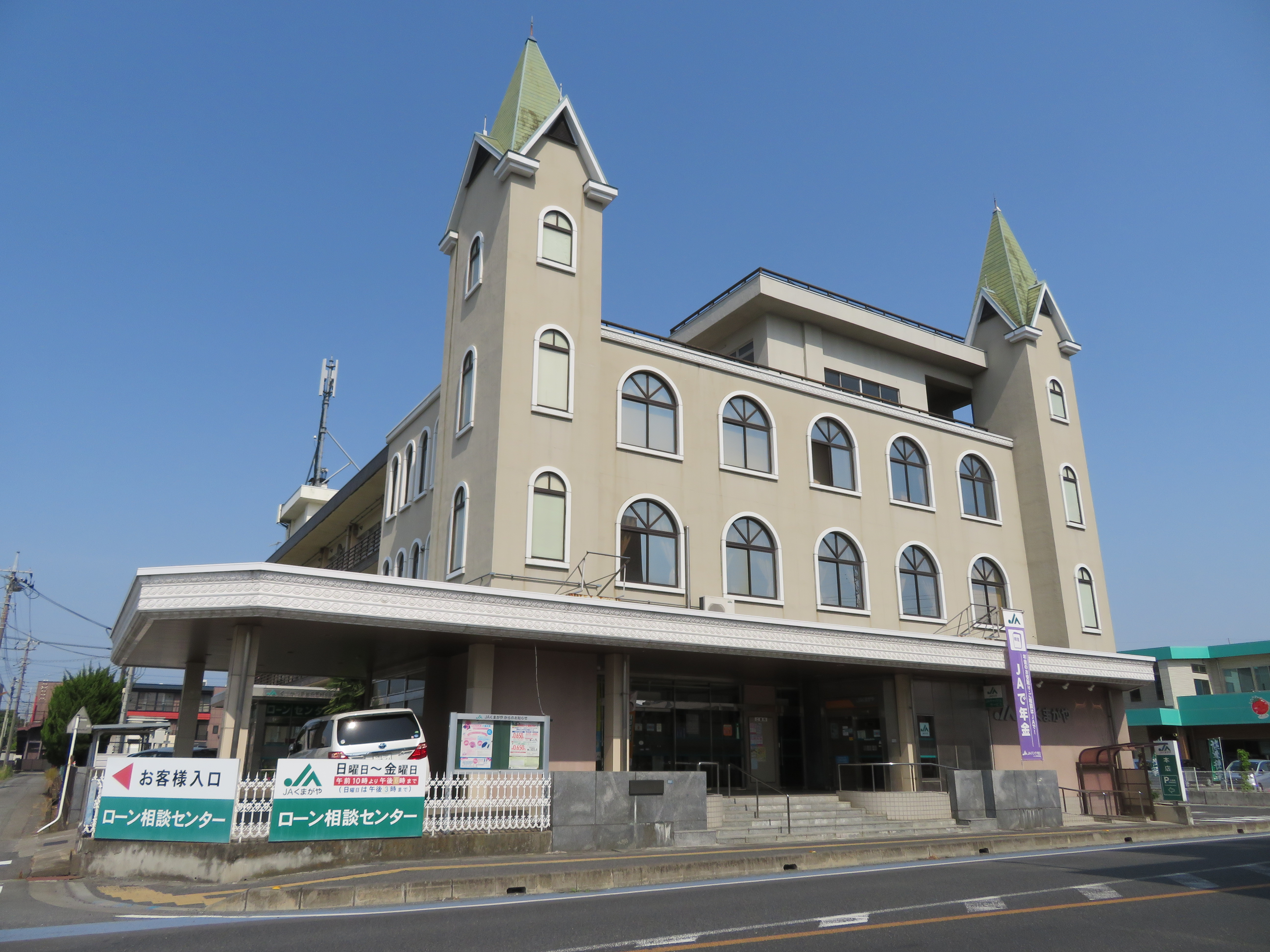 くまがや農業協同組合本店 Canon PowerShot SX720 HS